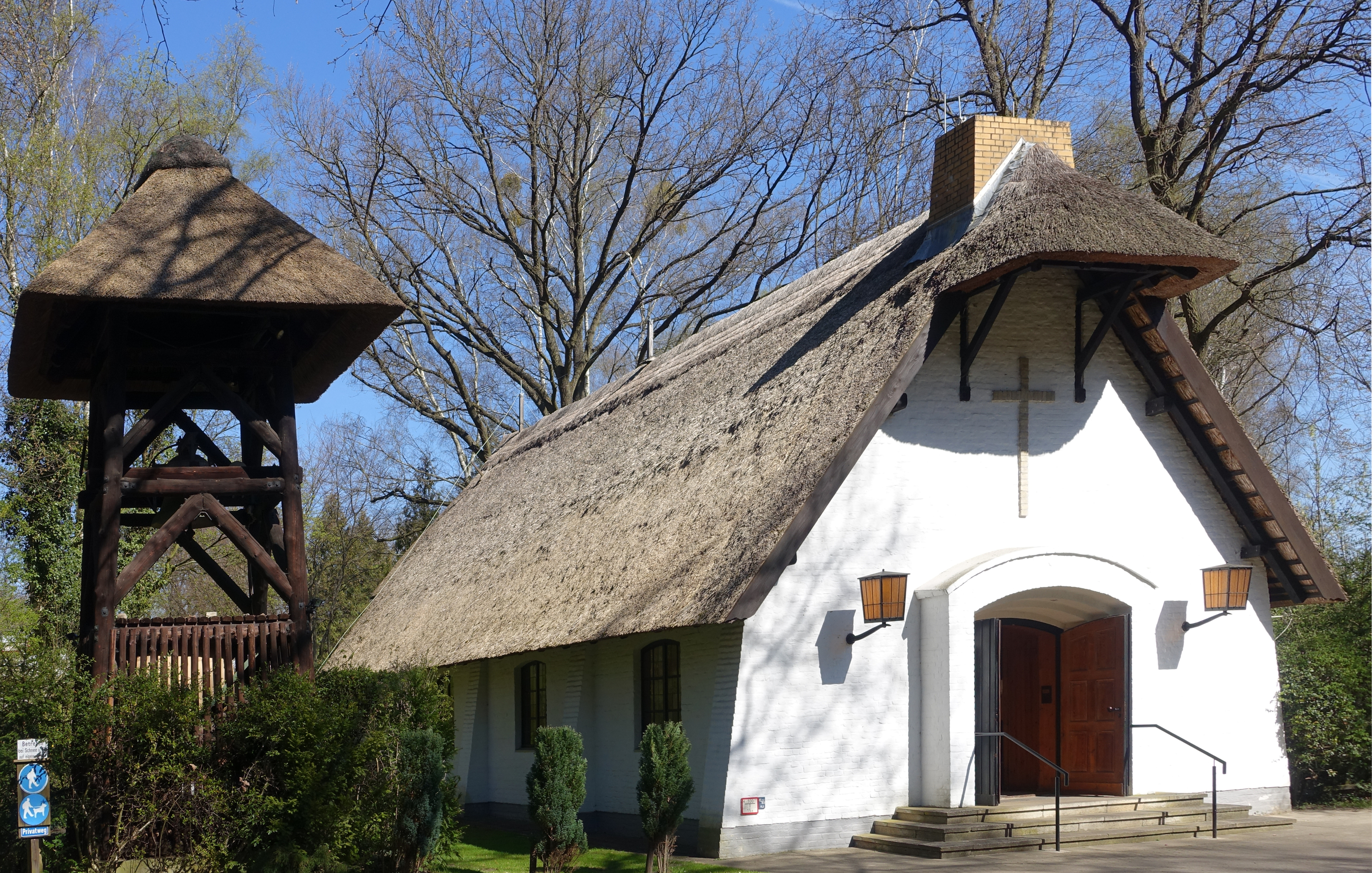 Blick auf Kapelle und Glockenträger